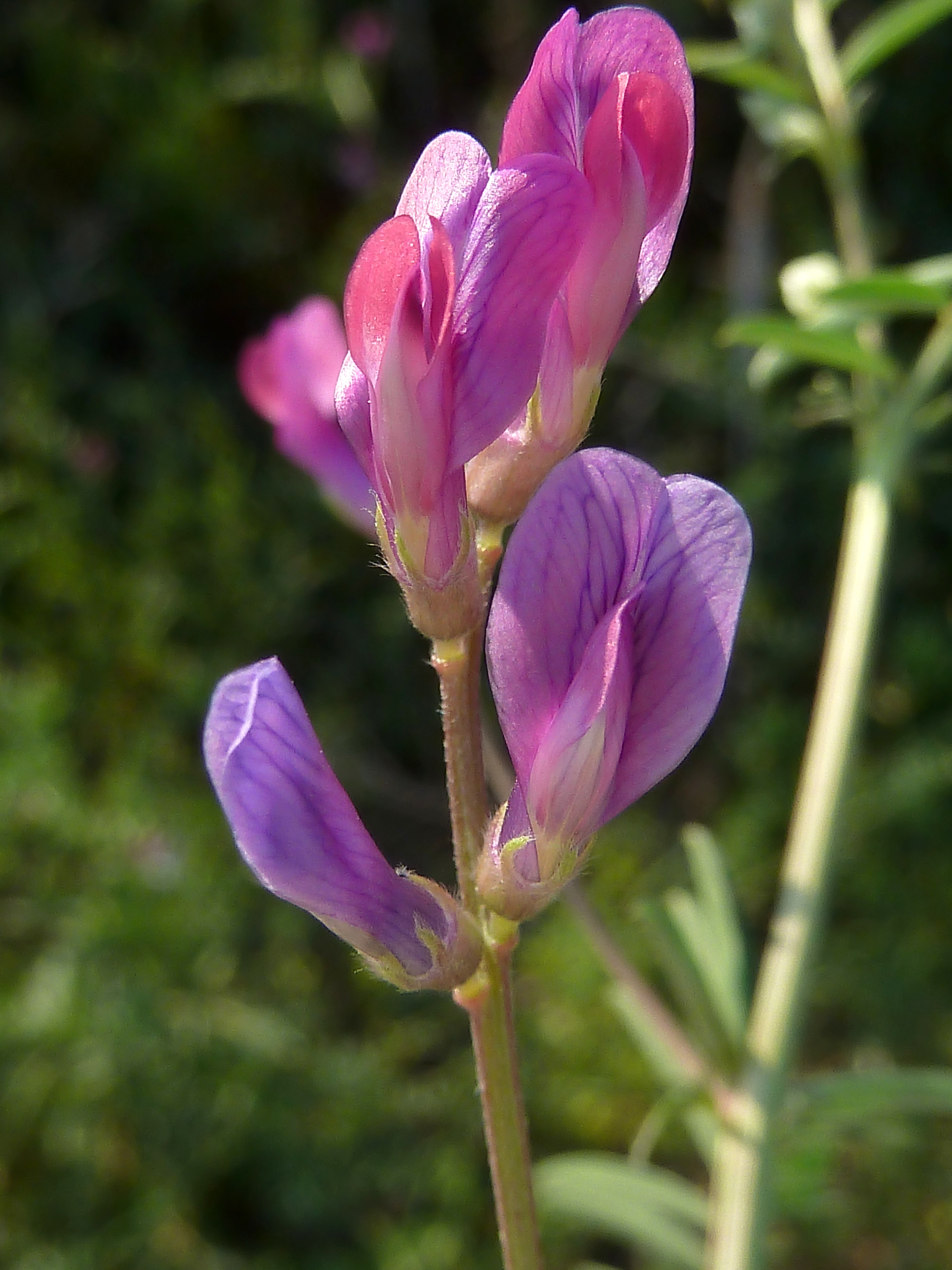 Vicia monantha (Algarroba) - Inflorescencia. - Camino del Canalillo, Albatera (Provincia de Alicante, España).